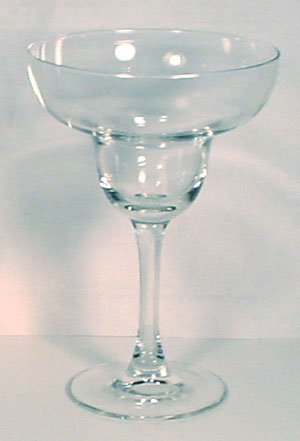 Margarita glass.